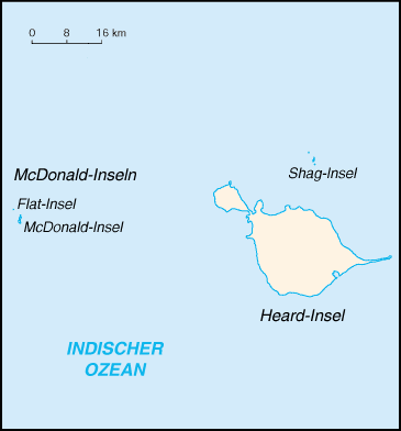 Karte der Heard- und McDonald-Inseln, CIA World Factbook, übersetzt